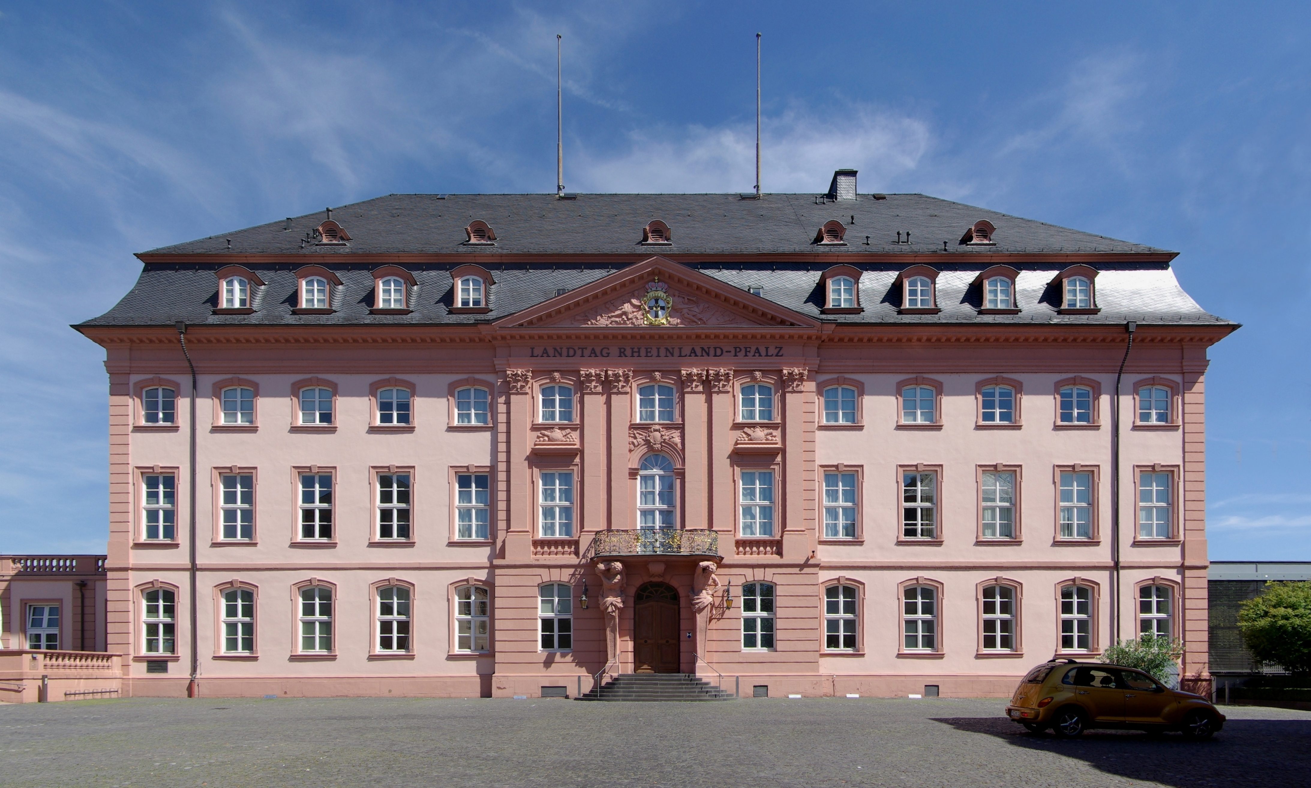 Mainz, Deutschhaus, heute Sitz des Landtages